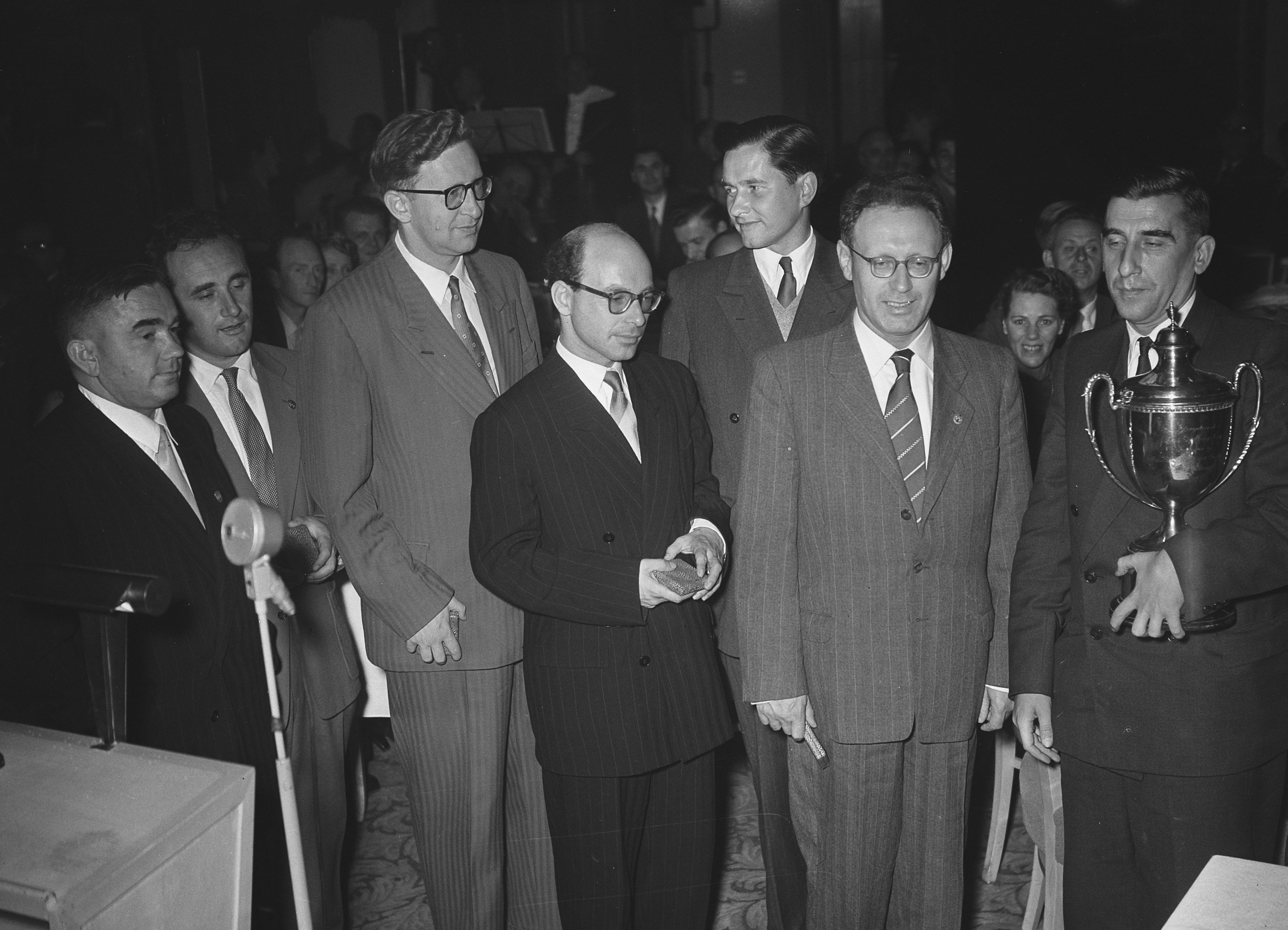 Collectie / Archief : Fotocollectie Anefo Reportage / Serie : [ onbekend ] Beschrijving : Prijsuitreiking schaakolympiade Amsterdam Datum : 25 september 1954 Locatie : Amsterdam, Noord-Holland Trefwoorden : Prijsuitreikingen, schaakolympiades Persoonsnaam : fide Fotograaf : Bilsen, Joop van / Anefo Auteursrechthebbende : Nationaal Archief Materiaalsoort : Glasnegatief Nummer archiefinventaris : bekijk toegang 2.24.01.09 Bestanddeelnummer : 906-7459